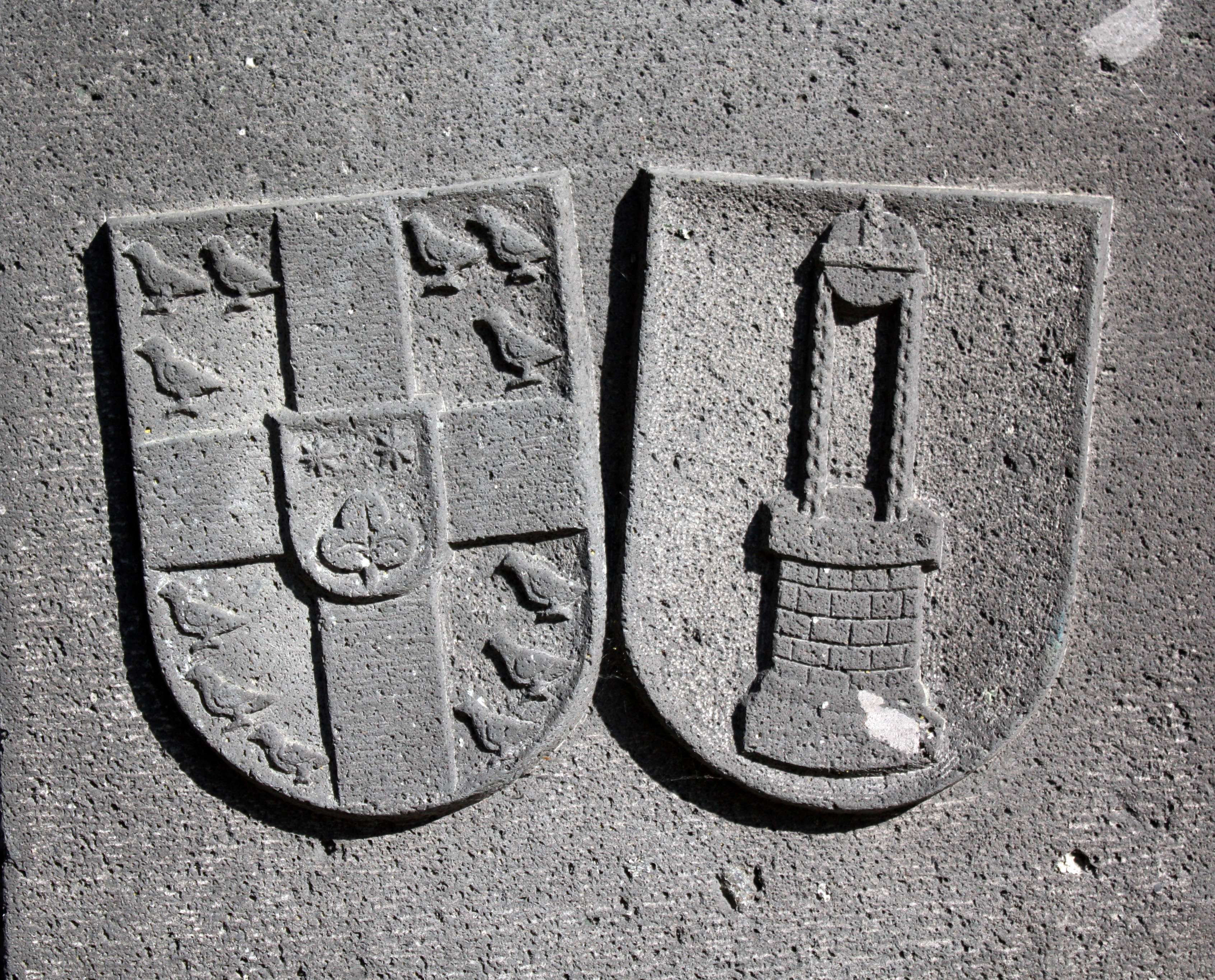 Hürth-Kendenich, Wappen auf einem Kendenicher Kreuz